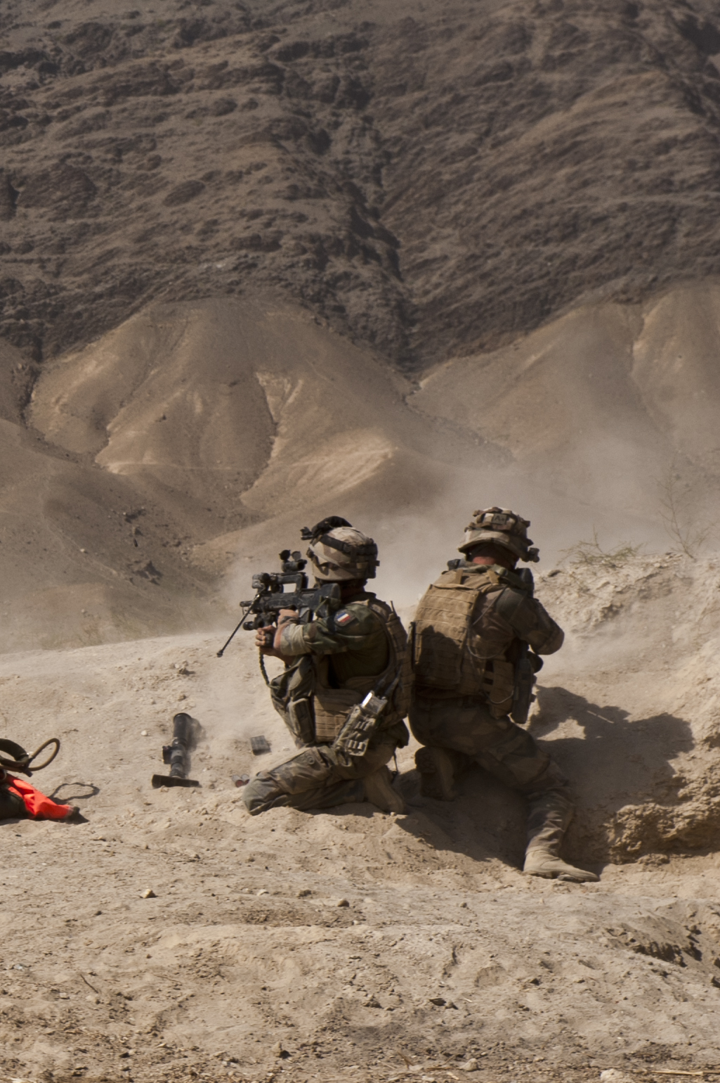 combats en vallée de Tagab - septembre 2010